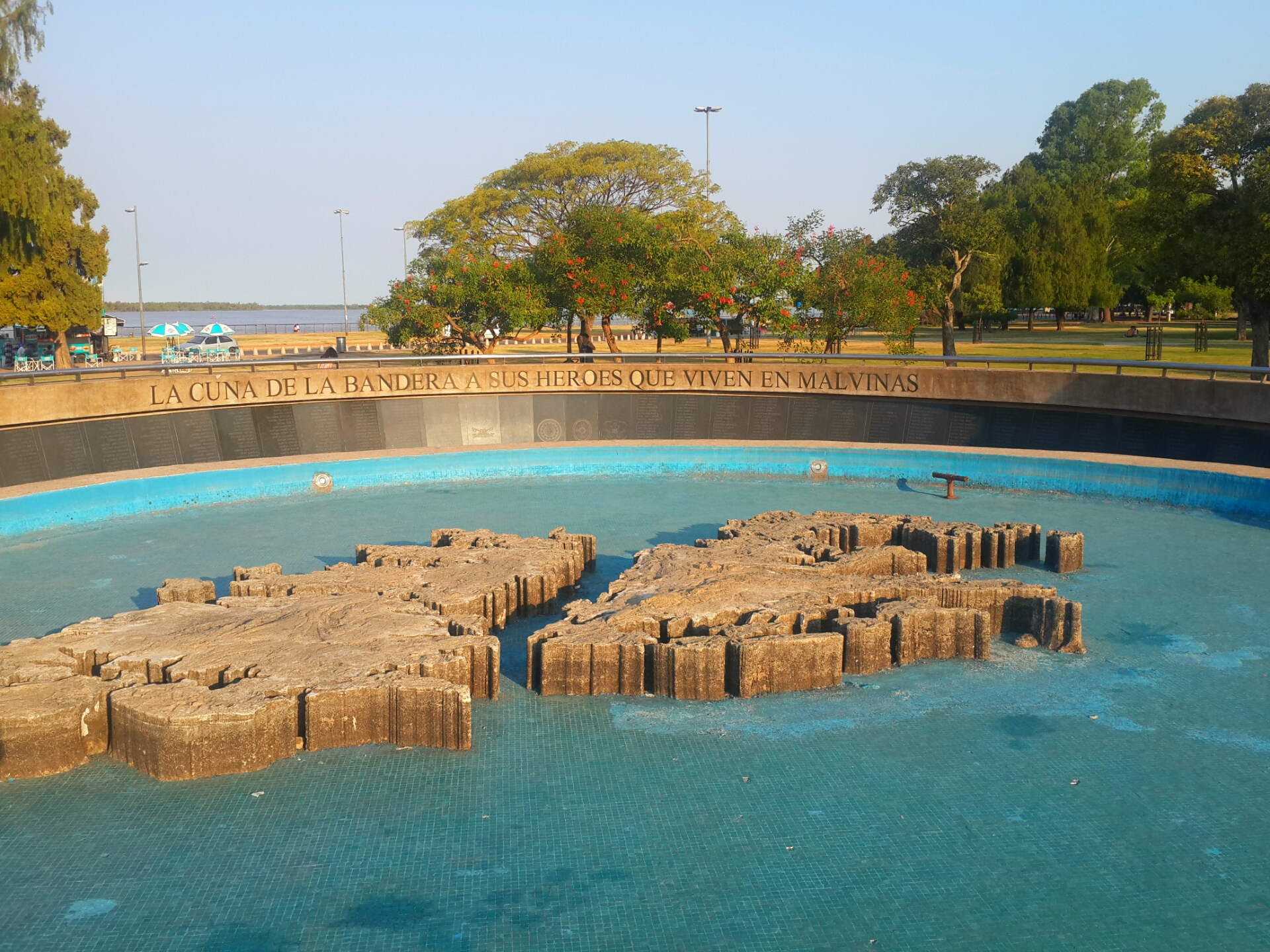 Monumento a los caídos en la guerra de las Malvinas. Cerca del monumento a la bandera. Rosario, Argentina.